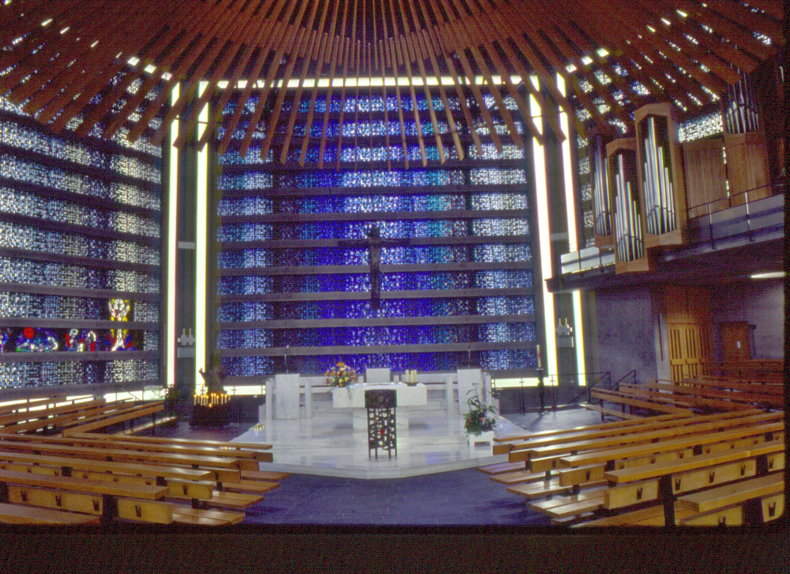 Konstanz, Maria Hilfe der Christen